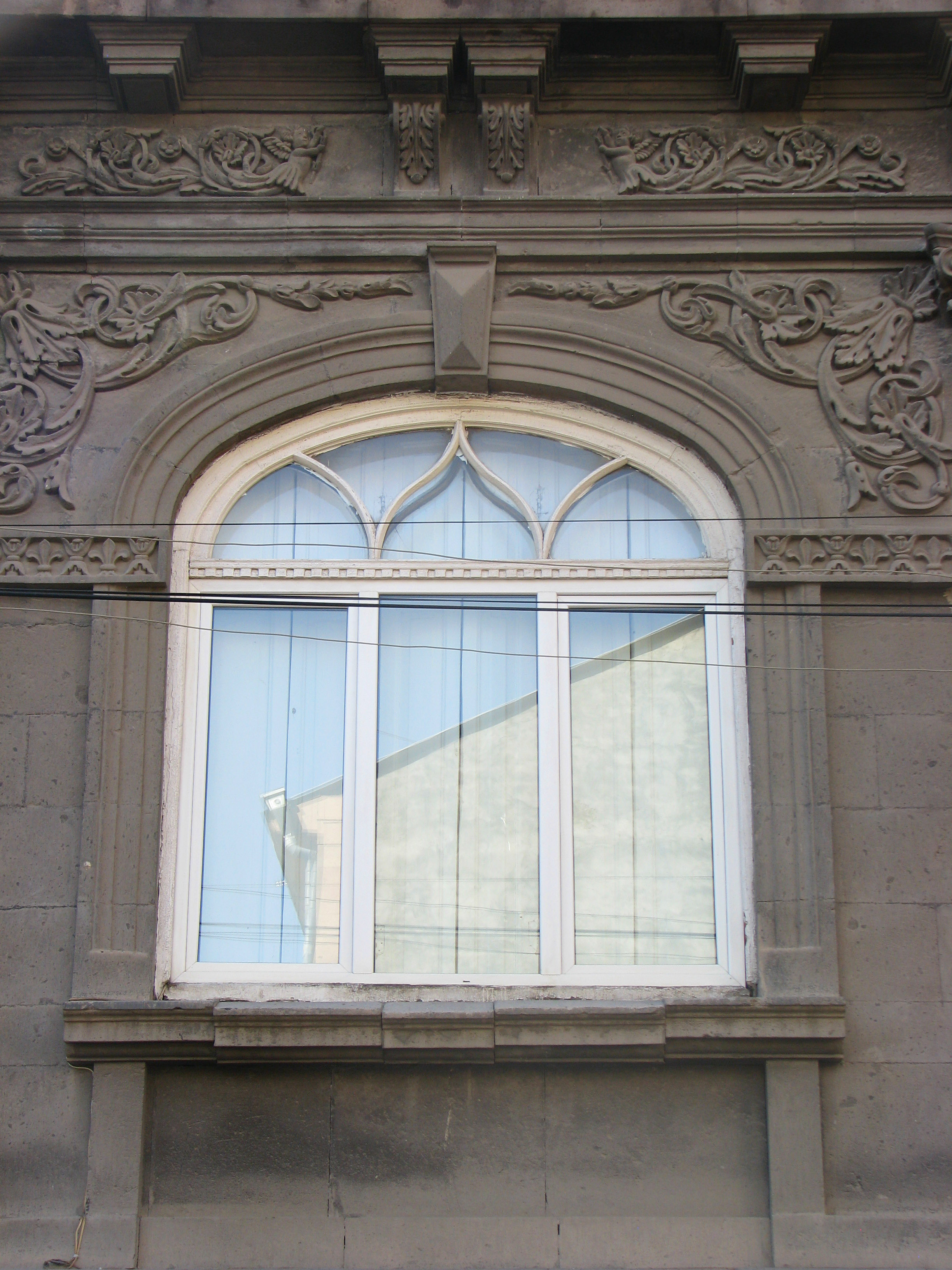 Ներկայիս Փիլիսոփայության ինստիտուտի շենքը նախկինում եղել է Ֆադեյ Թադևոսյանի տունը 6/206.6